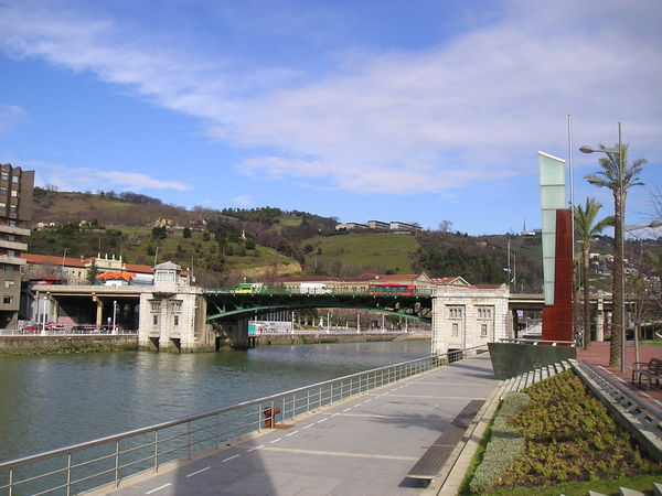 Deustuko zubia.